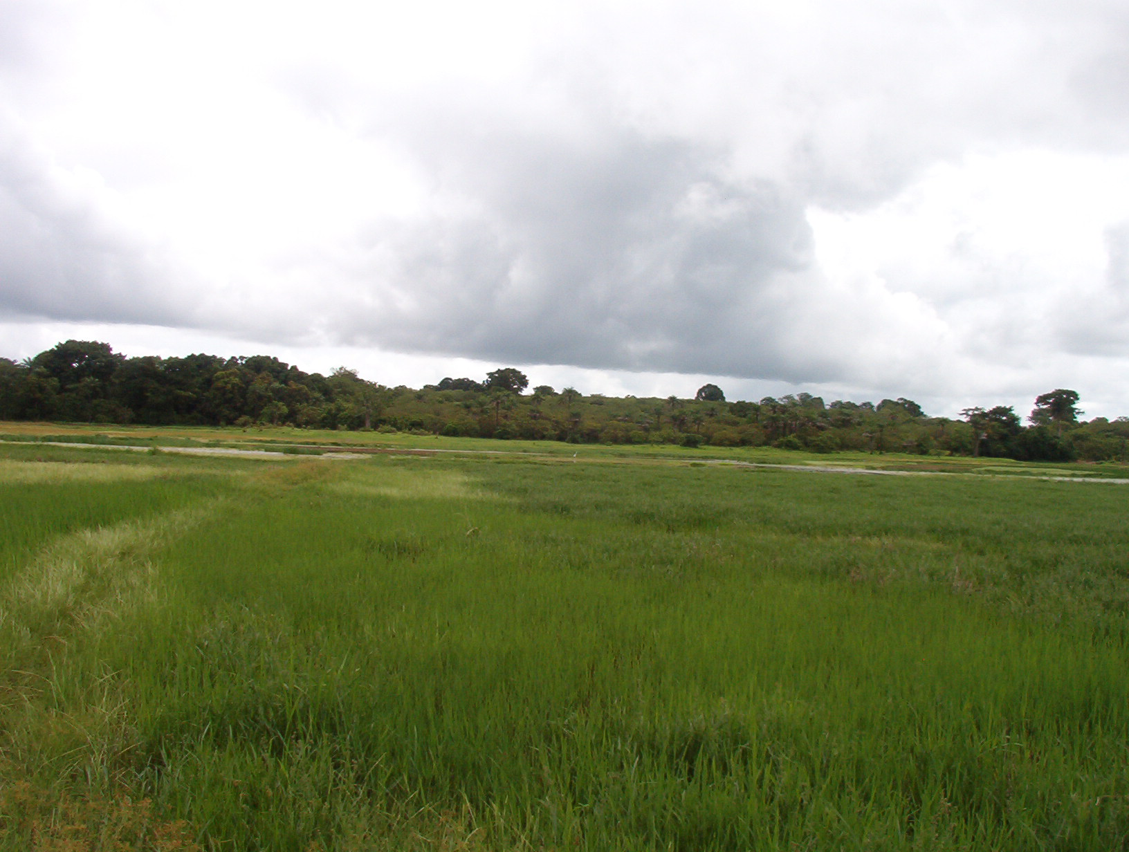 Coltivazione del riso - Guinea-Bissau